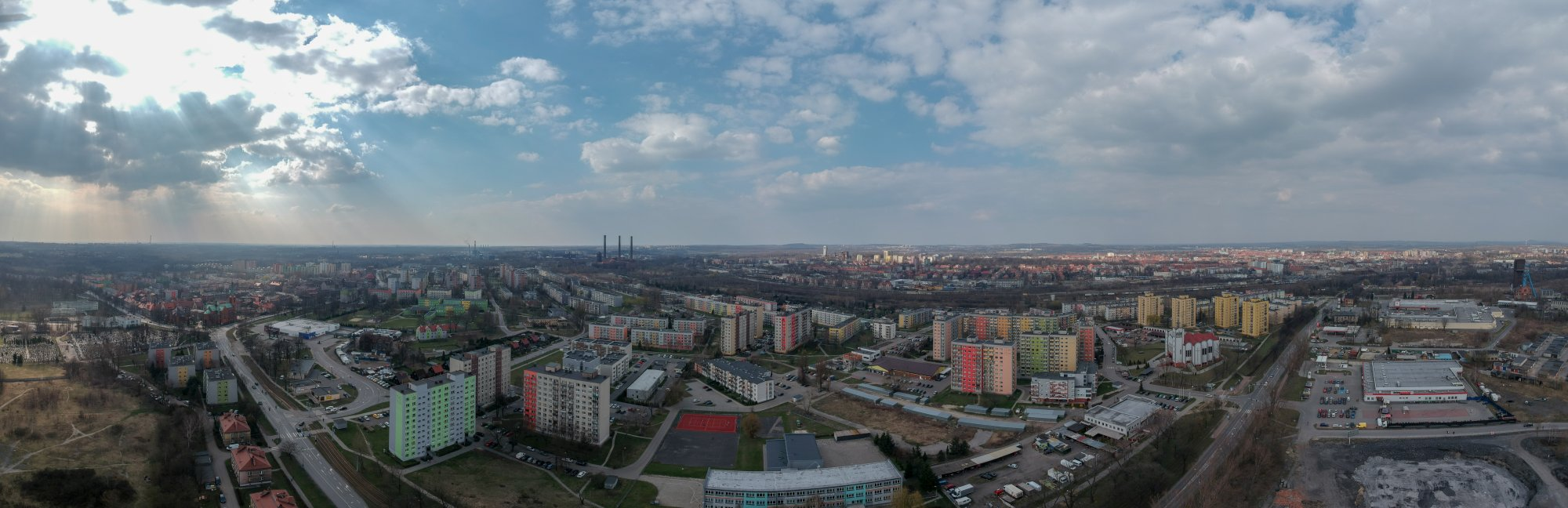 Bytom Szombierki, panorama okolic ul. Zabrzańskiej, fot. Przemek Neumann